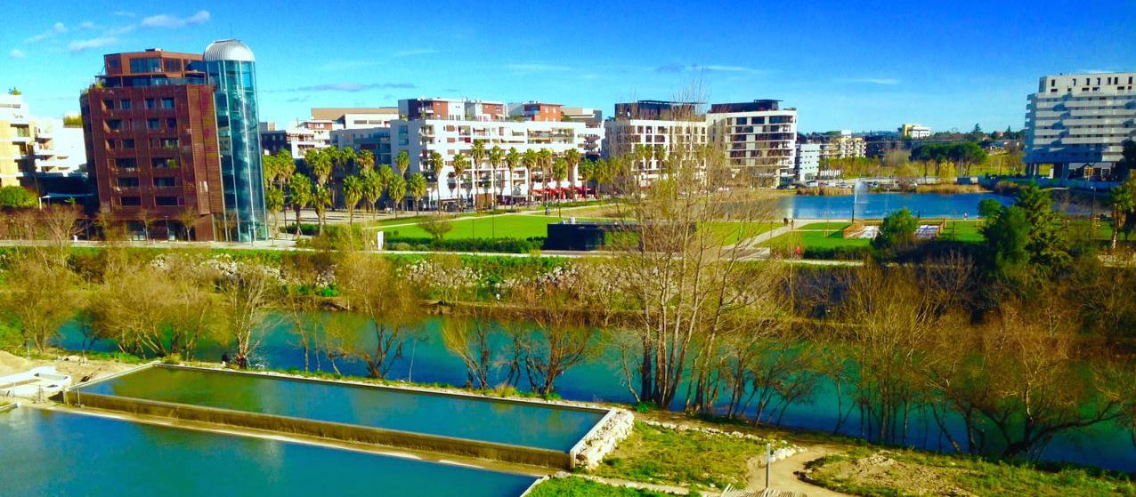 Panorama de Jacques Coeur, quartier Port Marianne à Montpellier